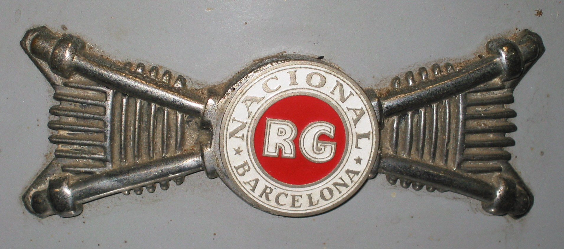 Emblem Nacional RG